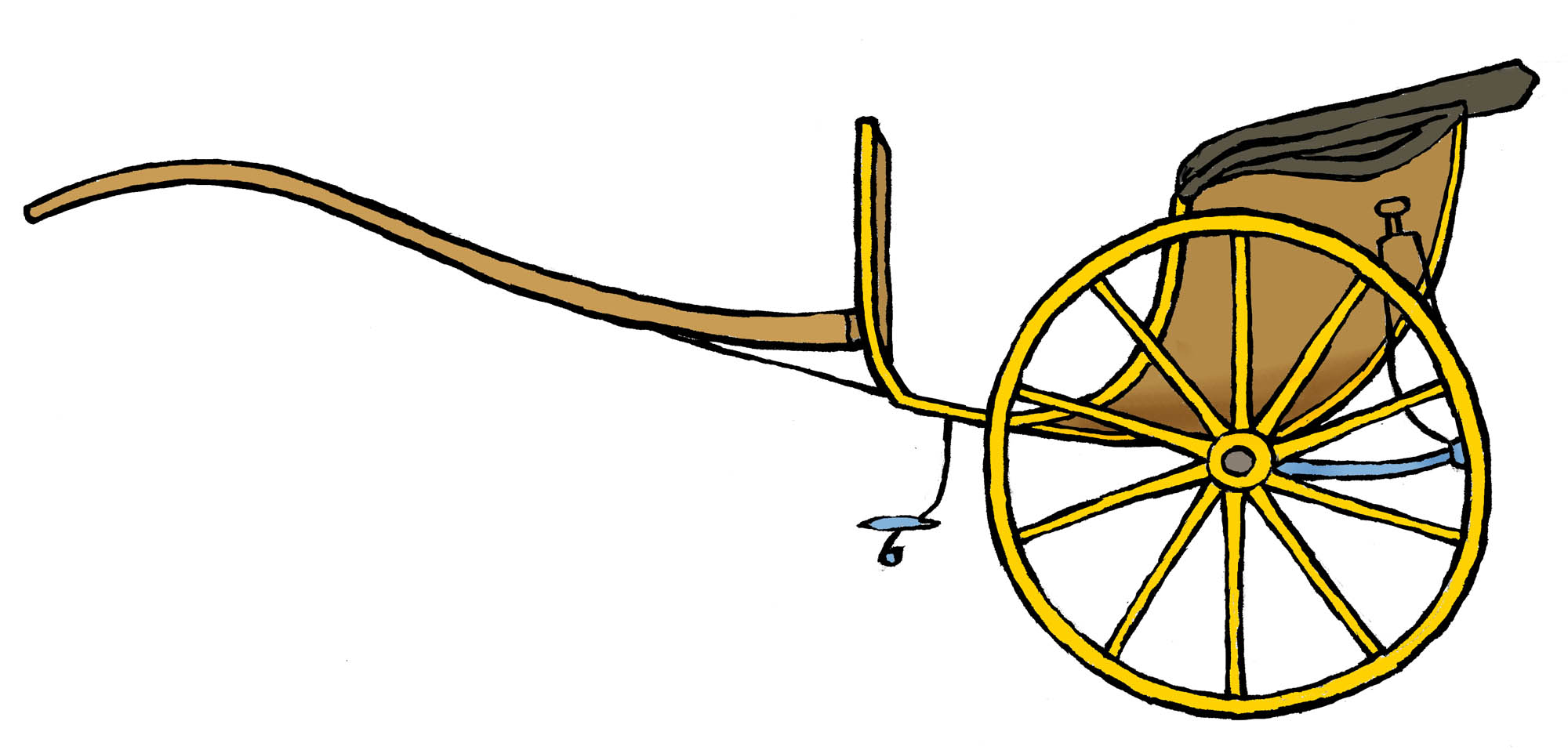 Boquet, voiture hippomobile créée par le carrossier français Boquet (ca 1777)